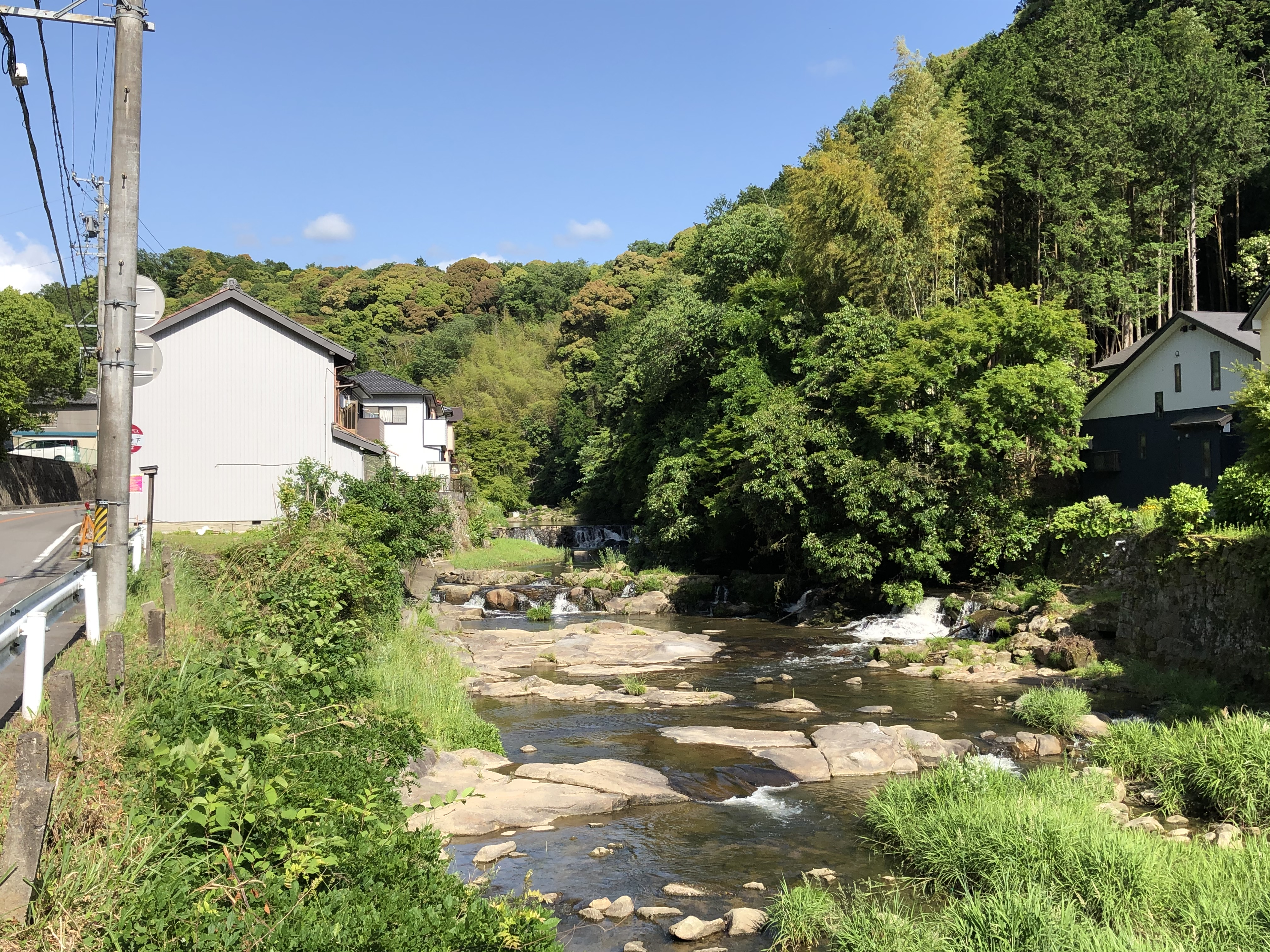 青木川（岡崎市滝町）